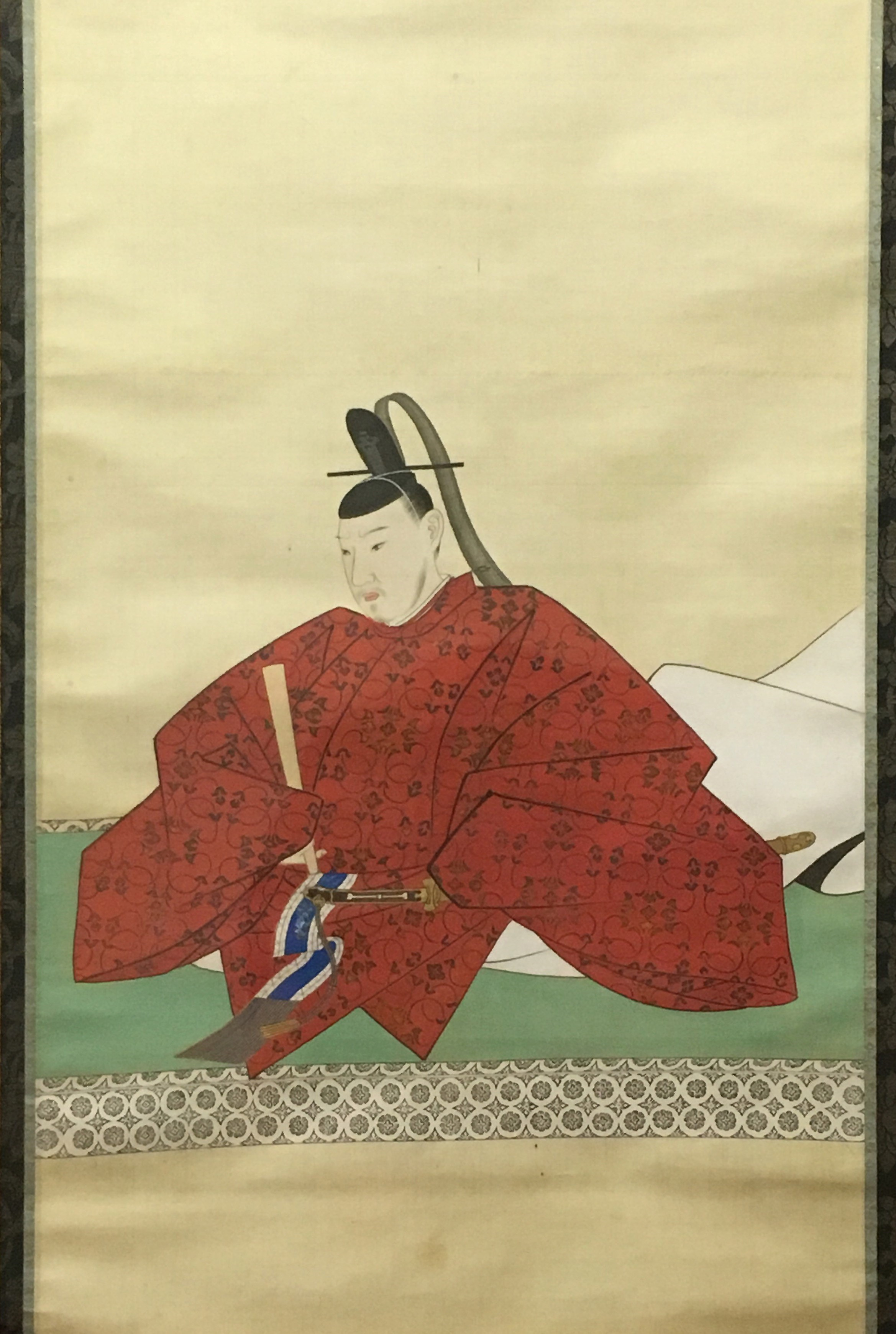 奥平昌敦の肖像(モノクロ)。